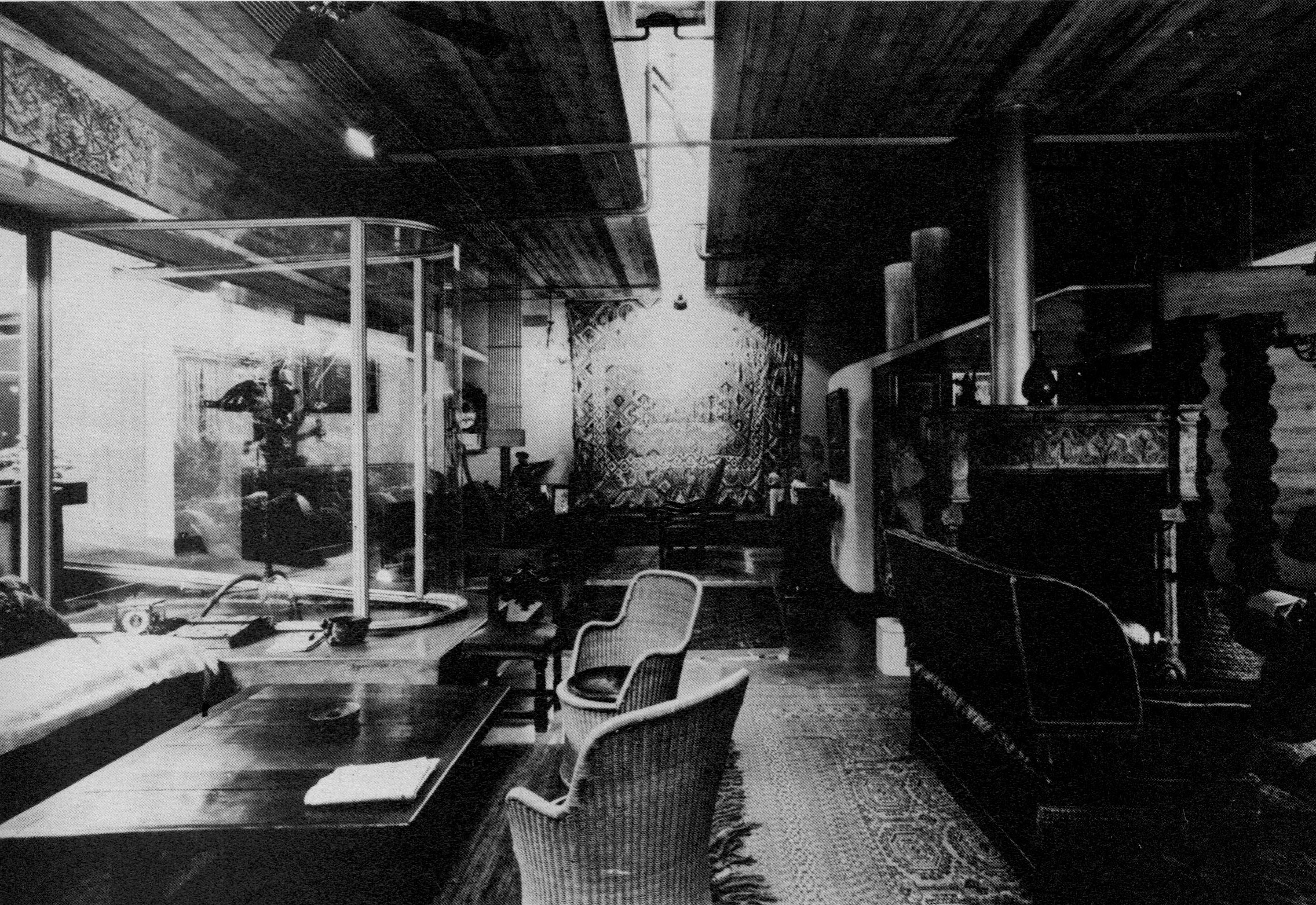 Sala de estar de la casa de Guido di Tella en Arribeños 1308, Buenos Aires. Diseñada por el arquitecto Clorindo Testa en 1968, fue demolida en 2011.